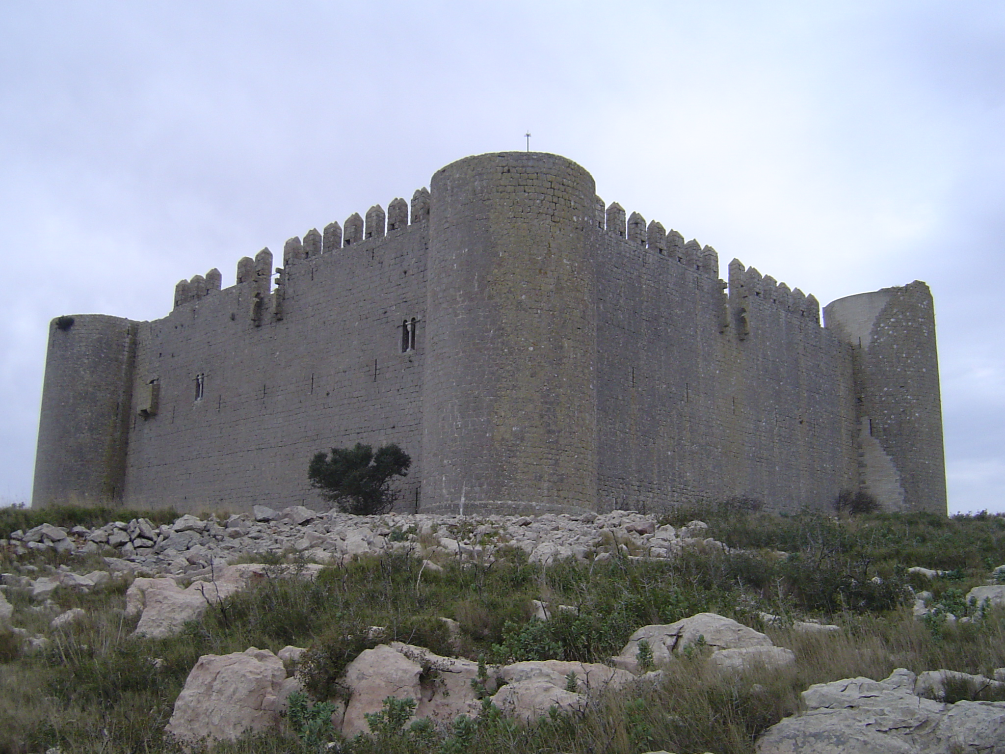 Vista nord del castell del Montgrí